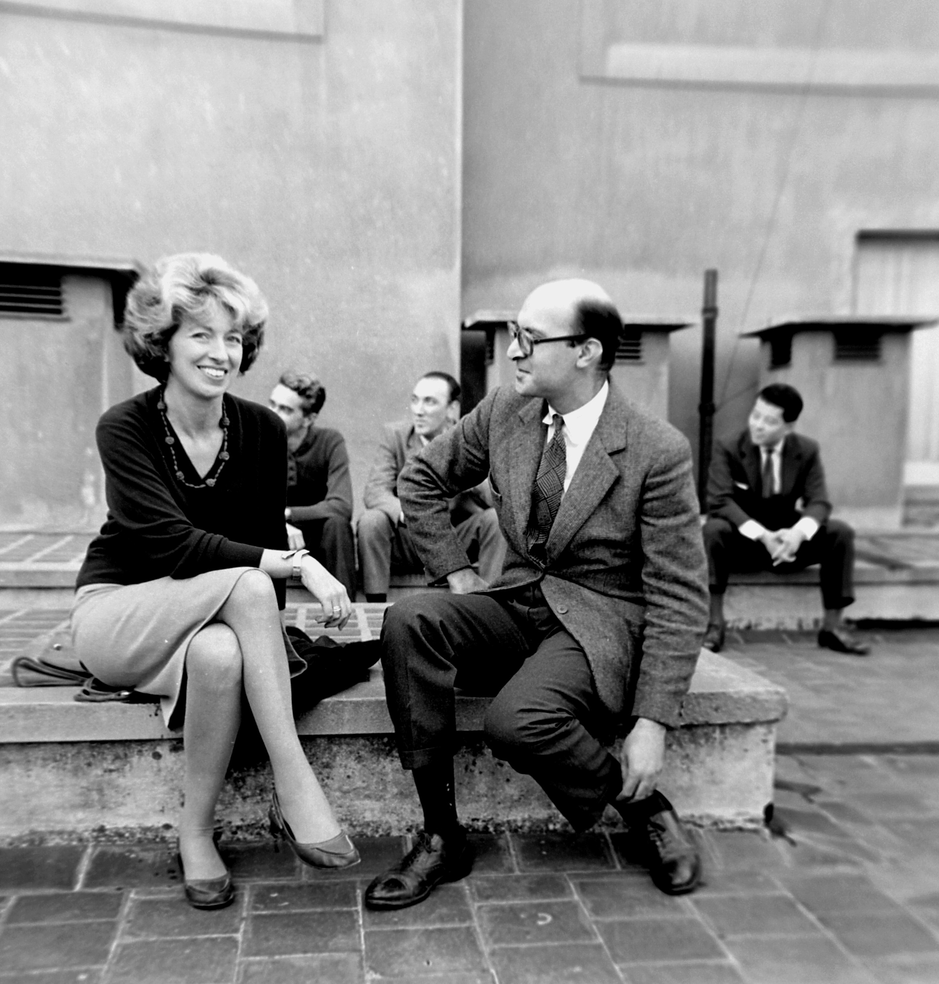 El Grupo de los Cinco en Buenos Aires. De izquierda a derecha: Sarah Grilo, Miguel Ocampo, José Antonio Fernández-Muro, Clorindo Testa y Kazuya Sakay.